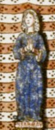 Isabela Francouzská (1242-1271)